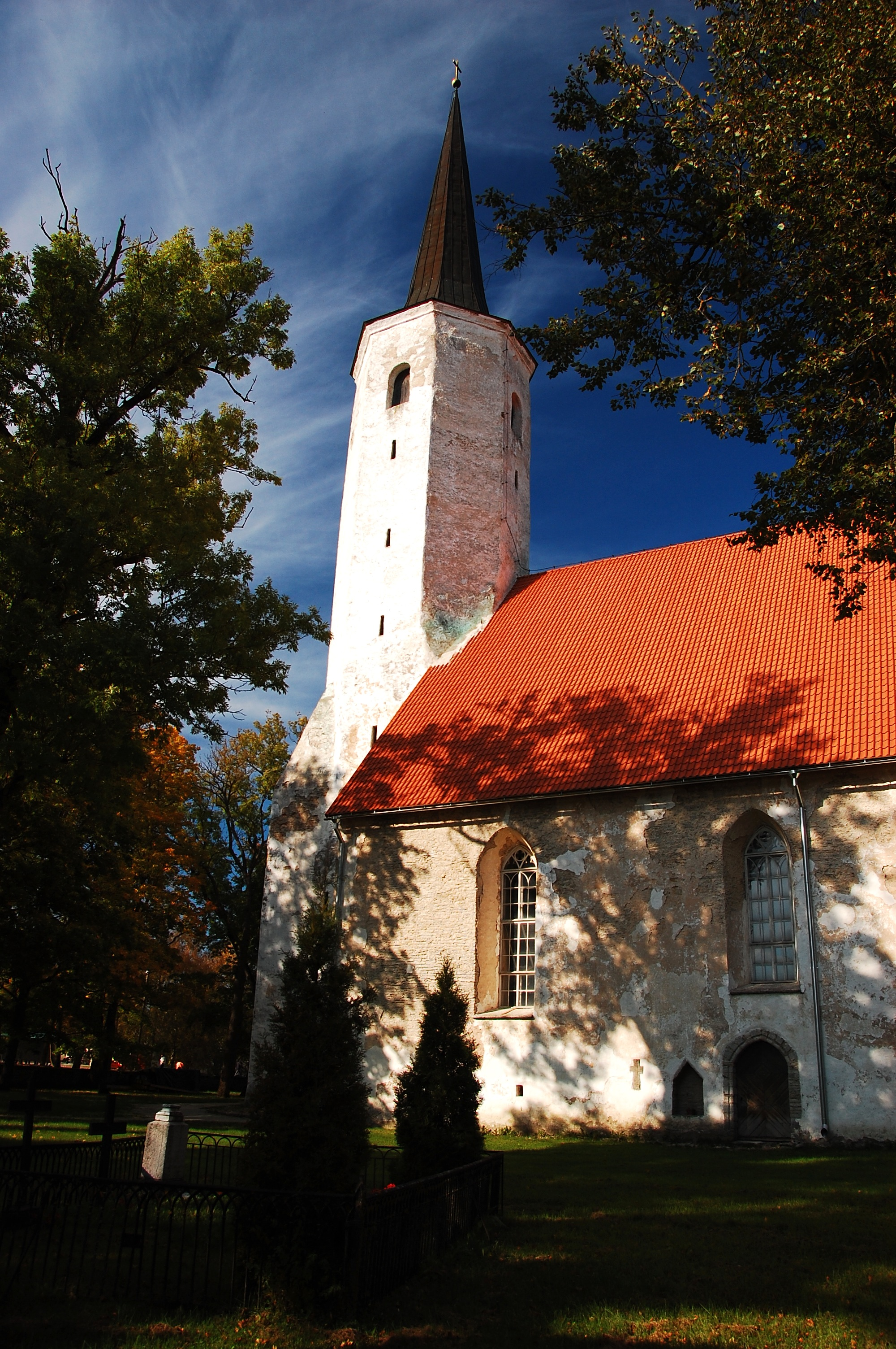 Haljala Püha Mauritiuse kirik